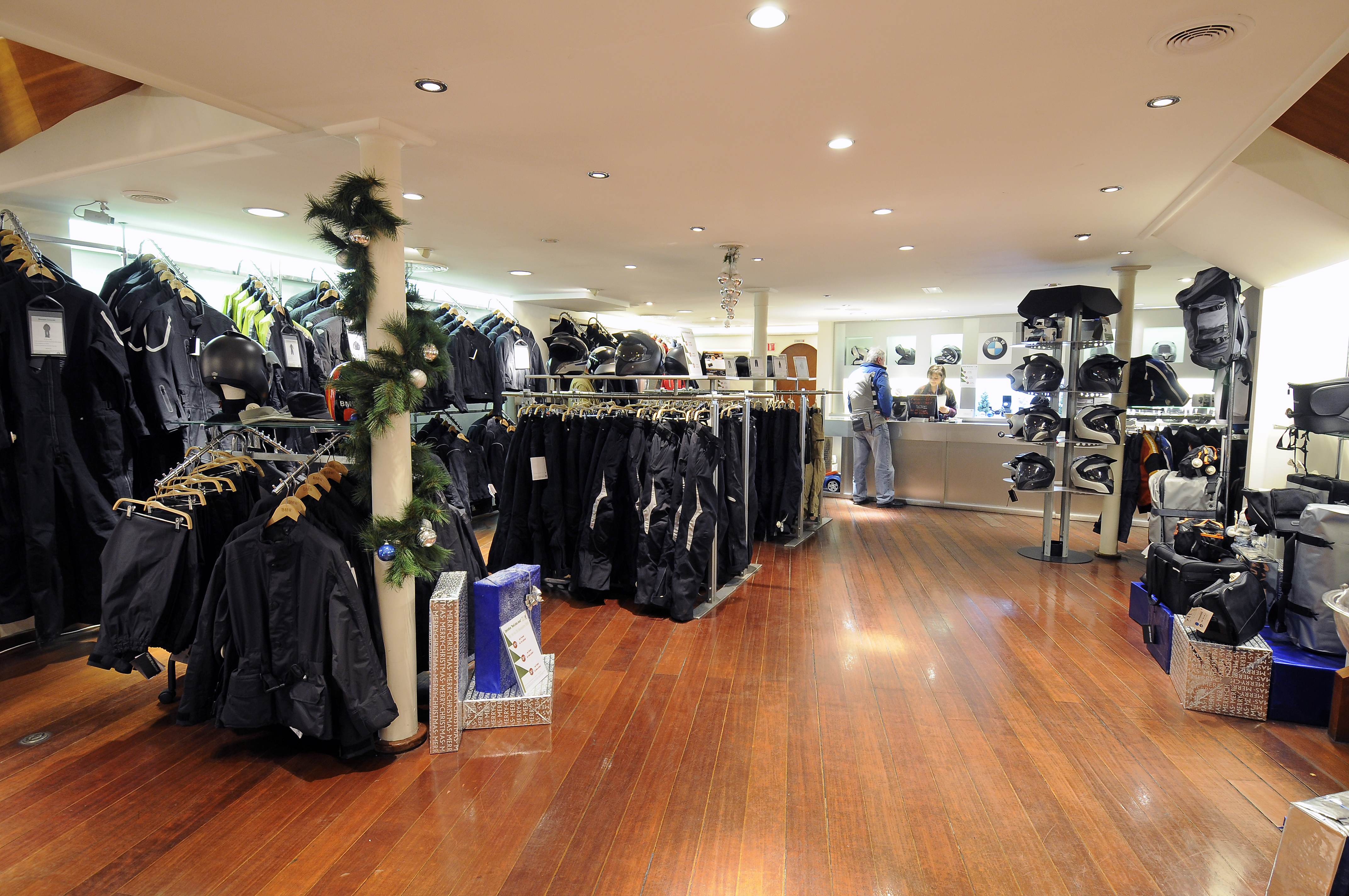 Equipement du pilote BMW Motorrad Etoile, 49 avenue de la Grande Armée, 75116 Paris.